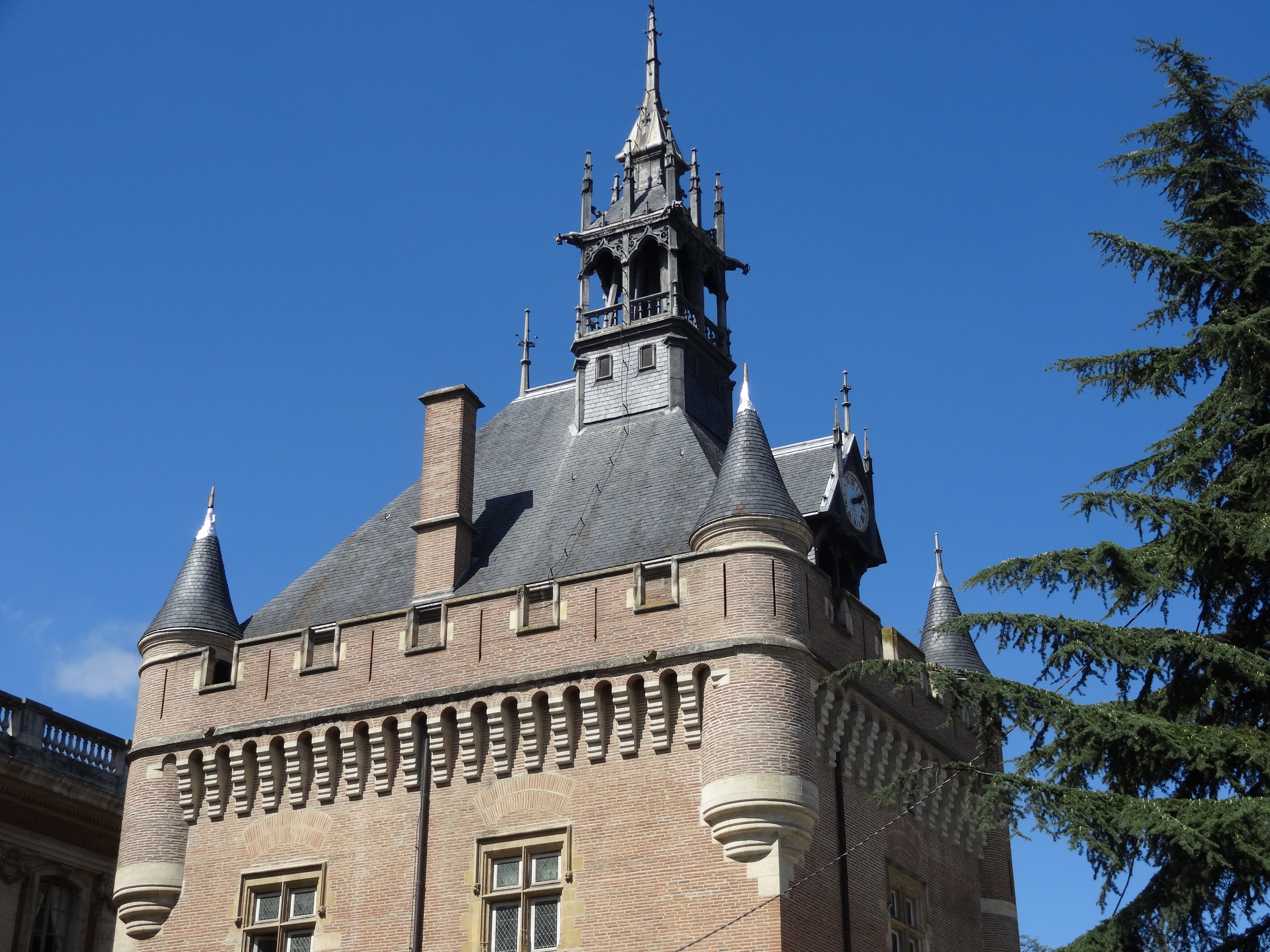 Donjon du Capitole de Toulouse .